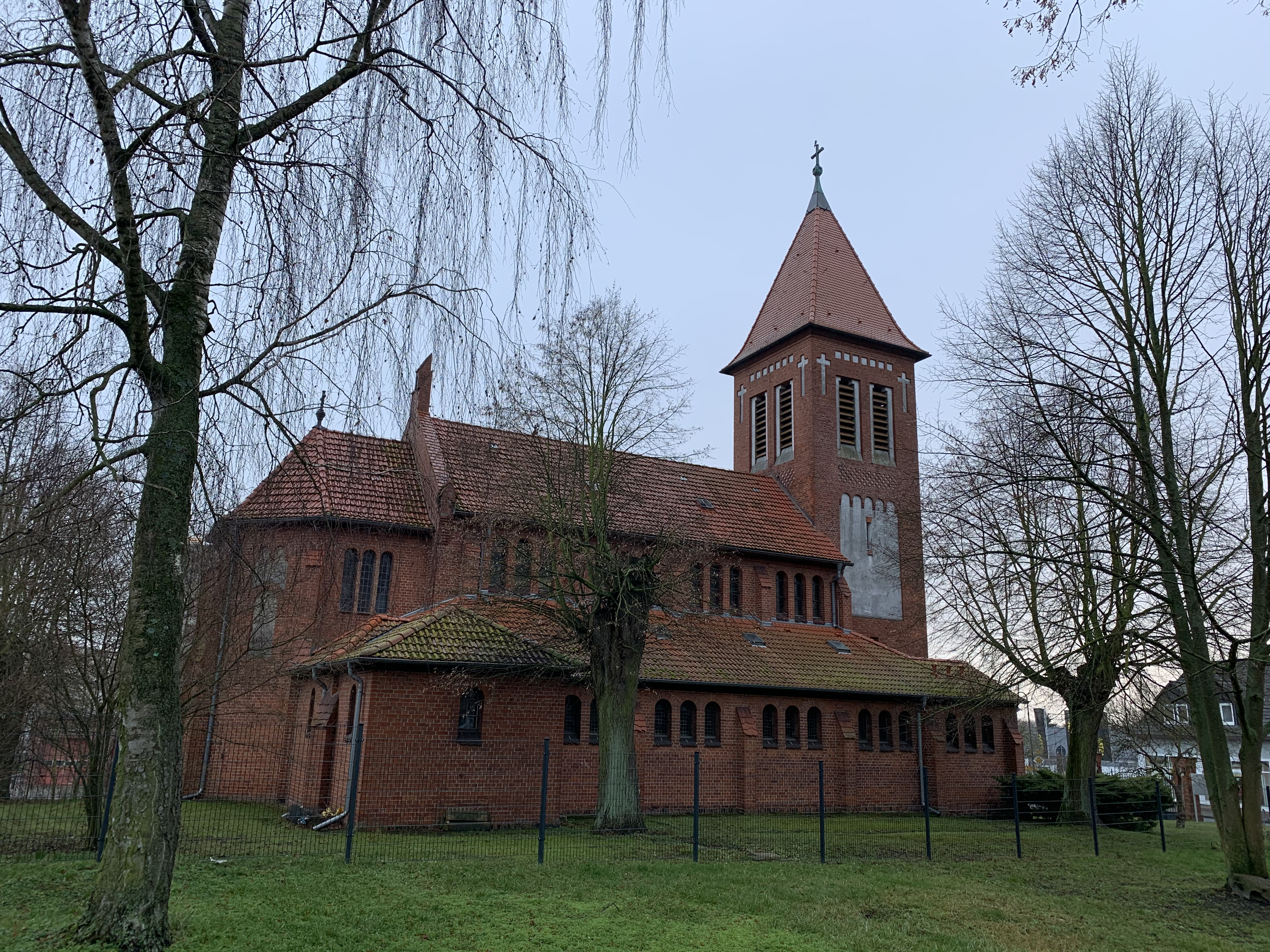 Die katholische Kirche Zur Heiligen Familie ist eine neogotische Kirche aus dem Jahr 1910 in Strasburg (Uckermark), einer Stadt im Landkreis Vorpommern-Greifswald in Mecklenburg-Vorpommern.